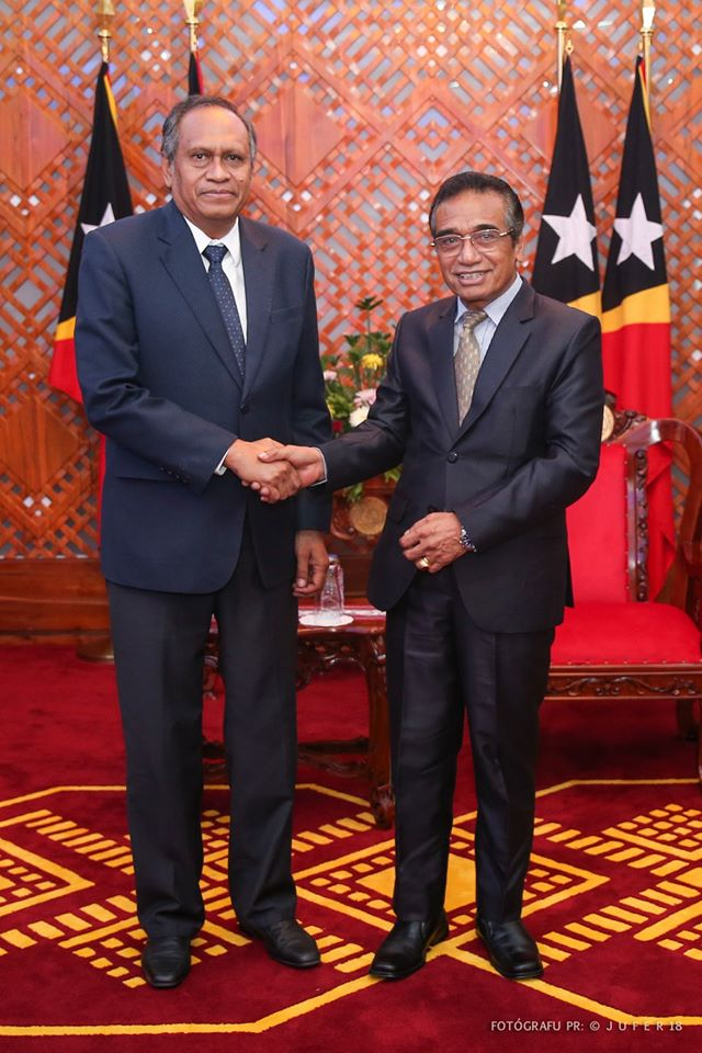 José Luís Guterres, Präsident von Oe-Cusi-Ambeno und Francisco Guterres, Präsident von Osttimor